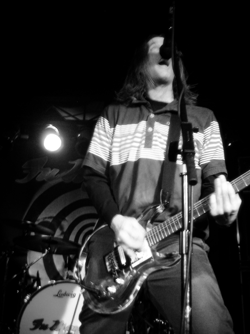 Hell on Wheels